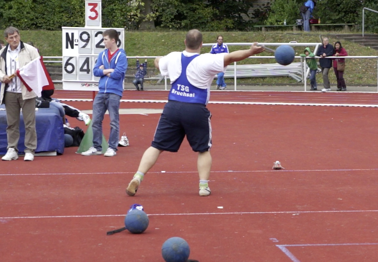 Drehtechnik Schleuderball. Haltephase des Schleuderbals vor dem Eindrehen. Martin Michael Schmidt von der TSG Bruchsal. Mehrfacher Badischer Meister in der Jugend und bei den Männern sowie Deutscher Meister in der Jugend mit 73,79m 1kg. In den Deutschen Ewigenbestenliste bei den Männern (1,5kg) steht er auf Platz 60.